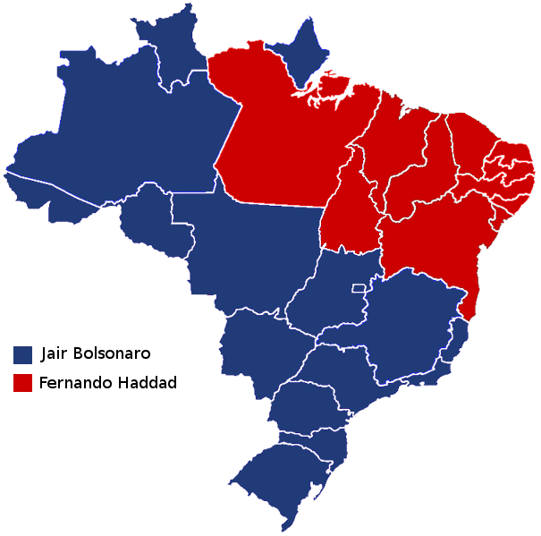 Candidats arrivés en tête au second tour de la présidentielle brésilienne de 2018 par état